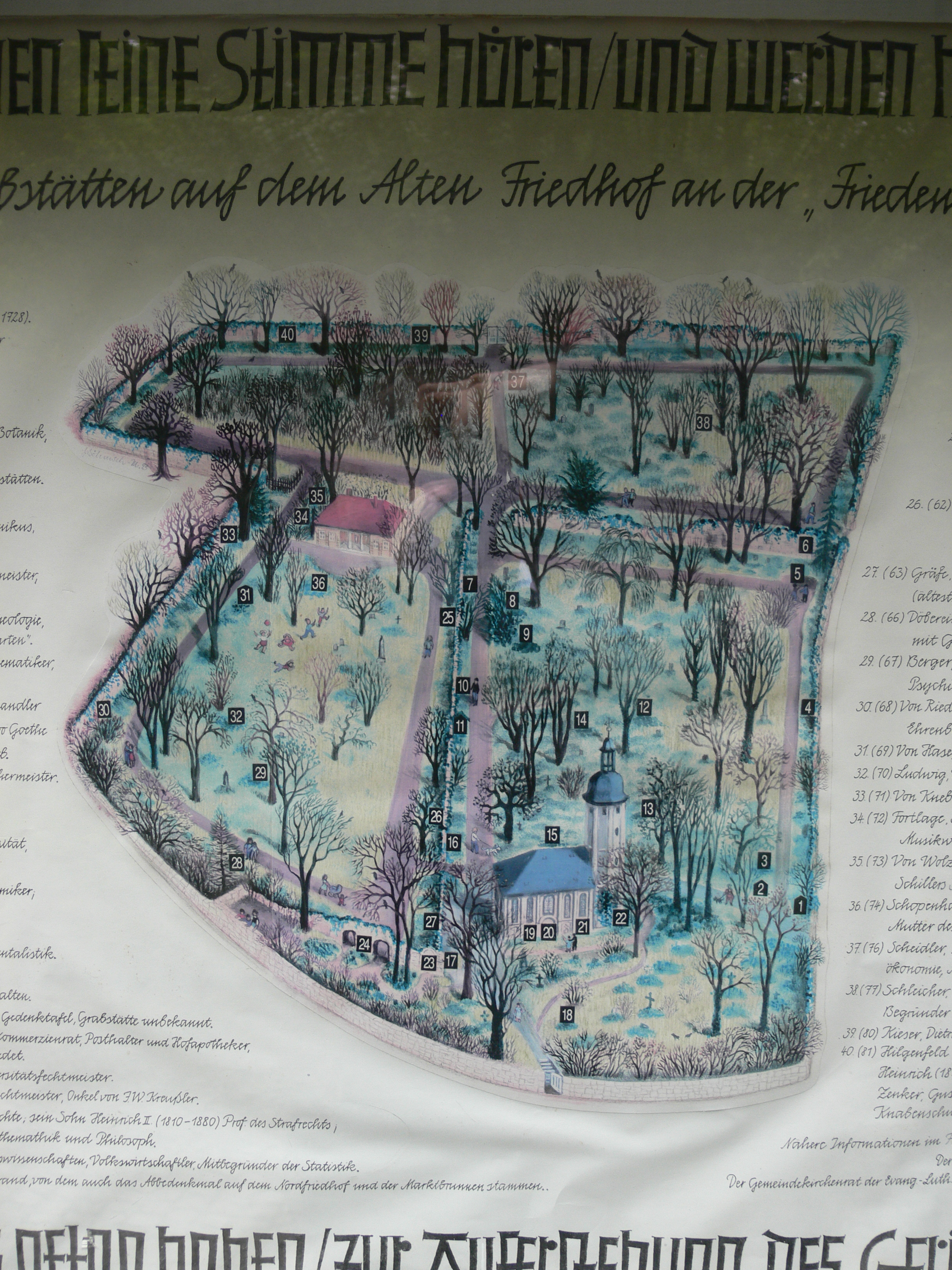 Jena, Johannisfriedhof Informationstafel mit Übersichtskarte